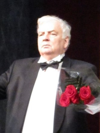 Михаил Державин в роли Маштю. Московский Театр Сатиры. Спектакль «Орнифль»